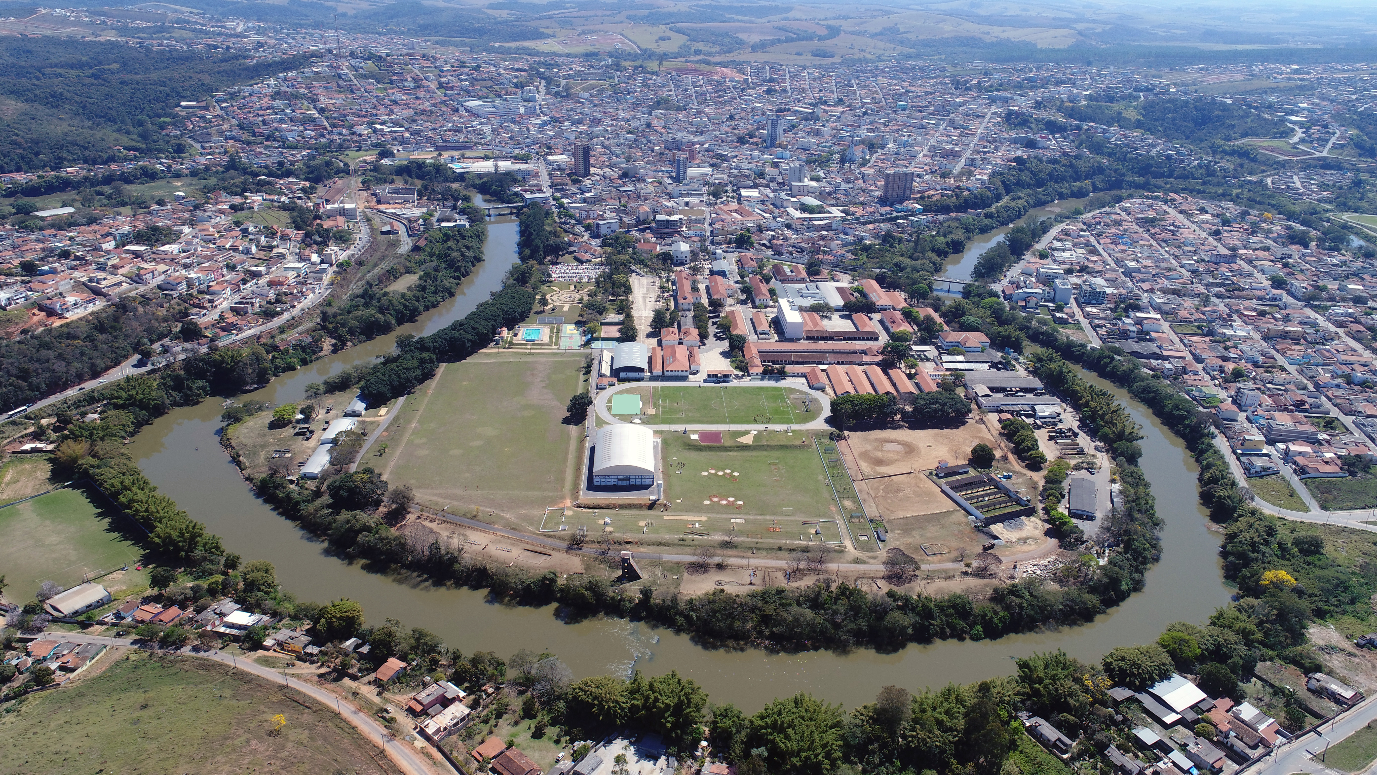 Vista Aérea da Escola de Sargentos das Armas - ESA e da Alça do Rio Verde em 2015